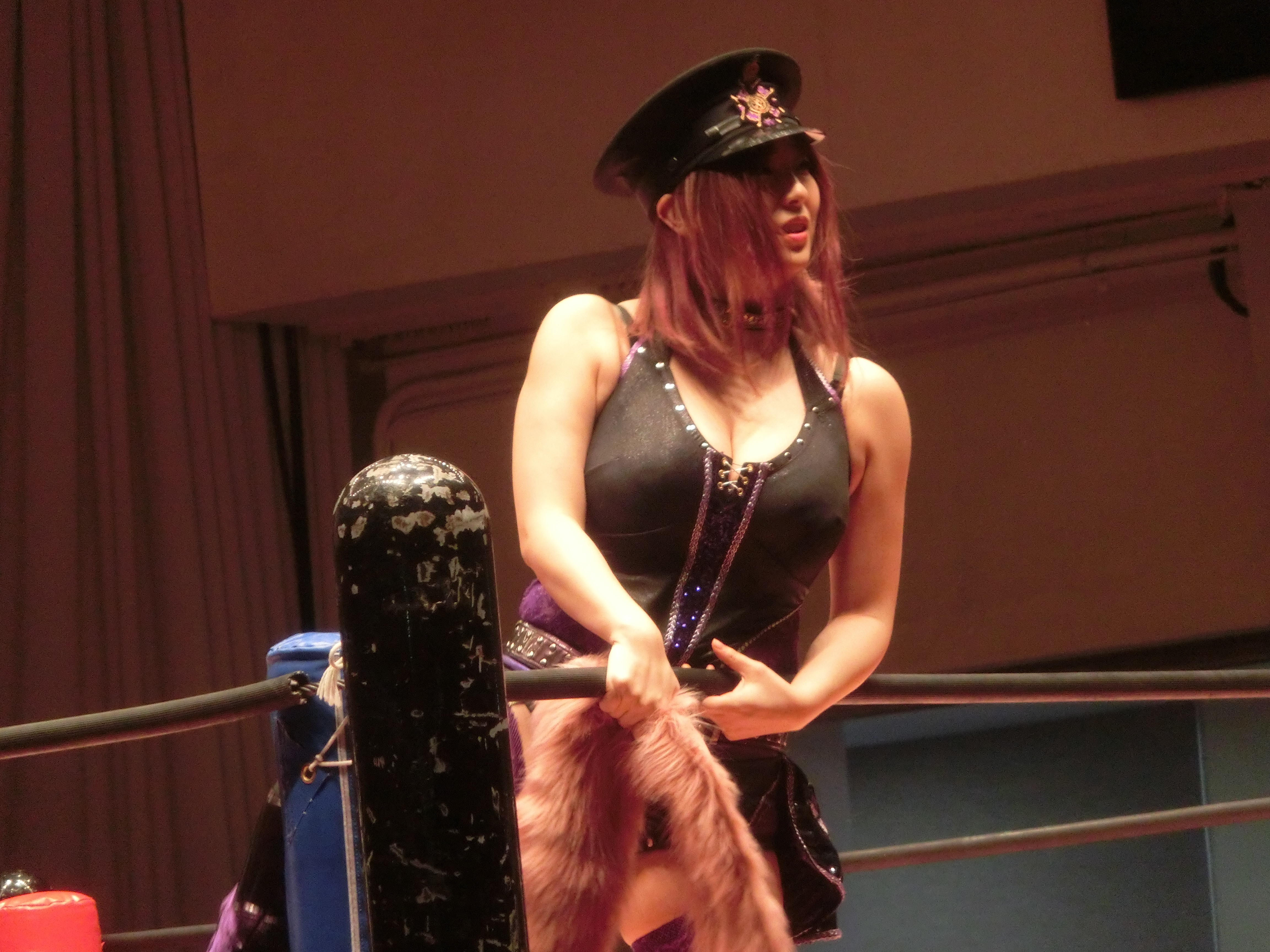 東京女子プロレス2019年1月4日、後楽園ホール大会